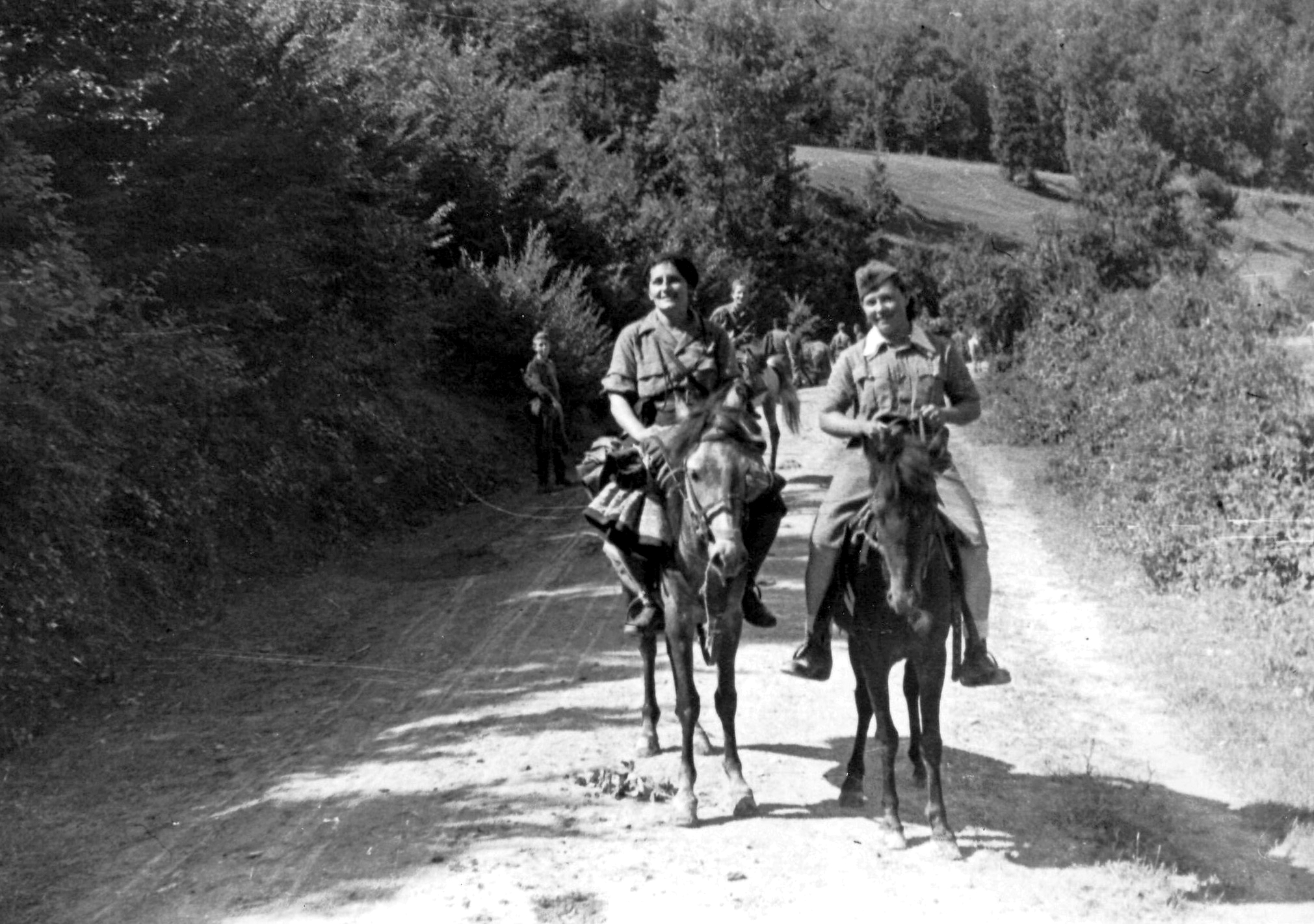 Srpskohrvatski / српскохрватски: Dve drugarice, borci NOVJ, kod Leposavića nakon prelaska Ibra, avgusta 1944.